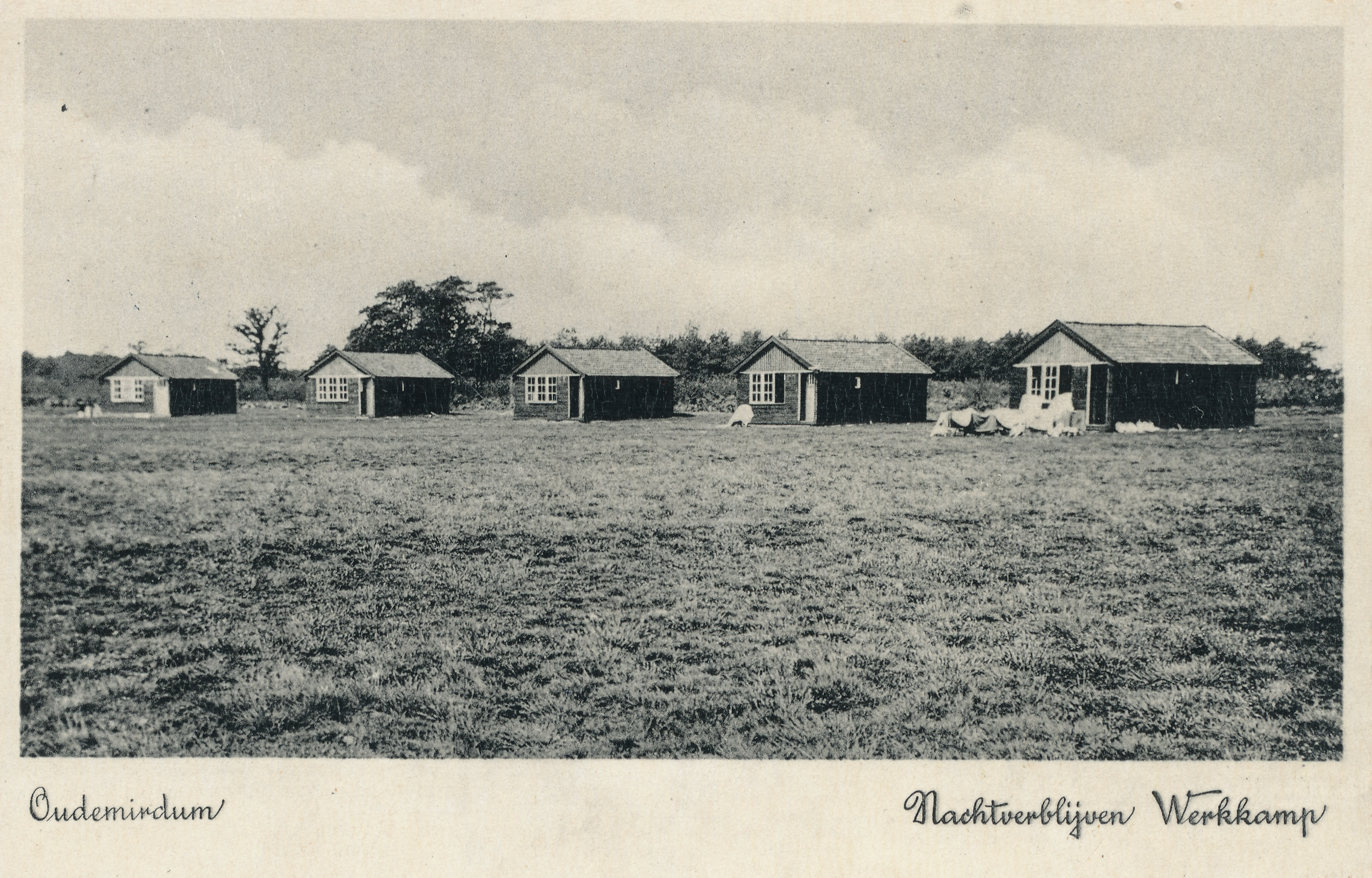 In deze barakken sliepen de jonge werklozen die enkele weken deelnamen aan een werk- en leerkamp in de periode 1934-1941